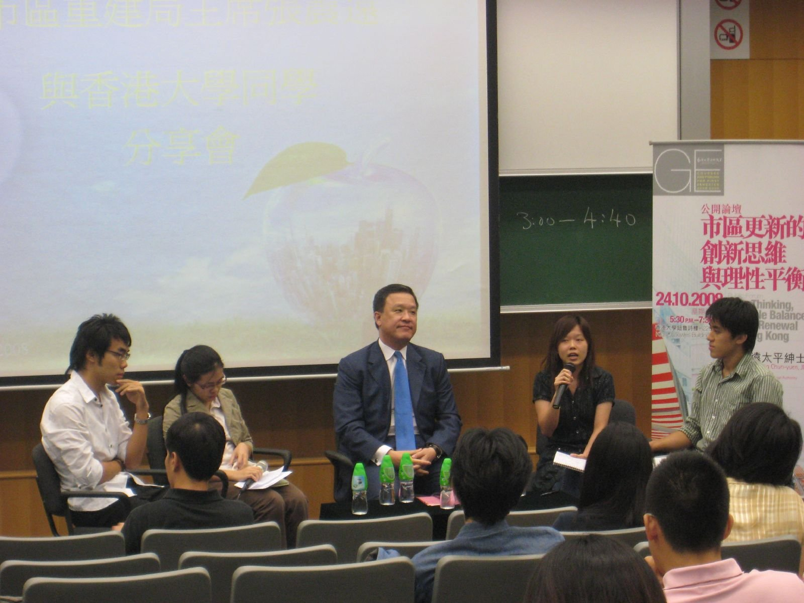 市建局主席張震遠參與港大通識教育部策劃的公開論壇「市區更新的創新思維與理性平衡」的講話